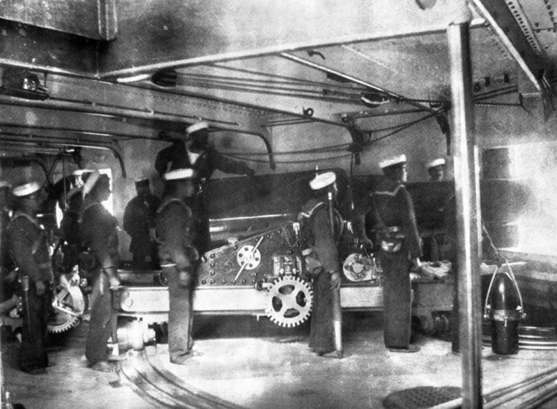 Bateria central del acorazado chileno Blanco Encalada